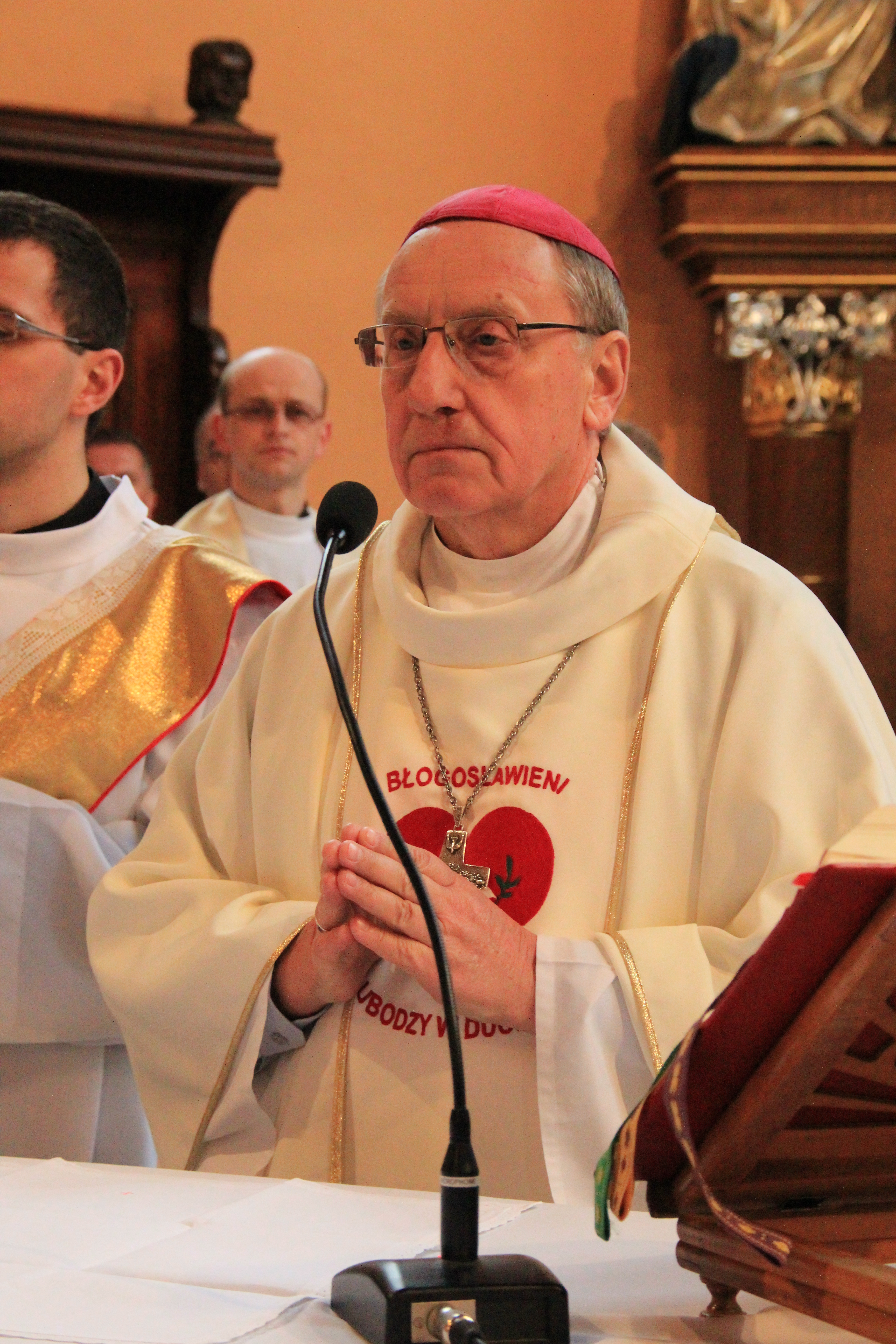 Abp Tadeusz Kondrusiewicz w czasie Archidiecezjalnych Dni Młodych w Barlinku w 2014 roku.